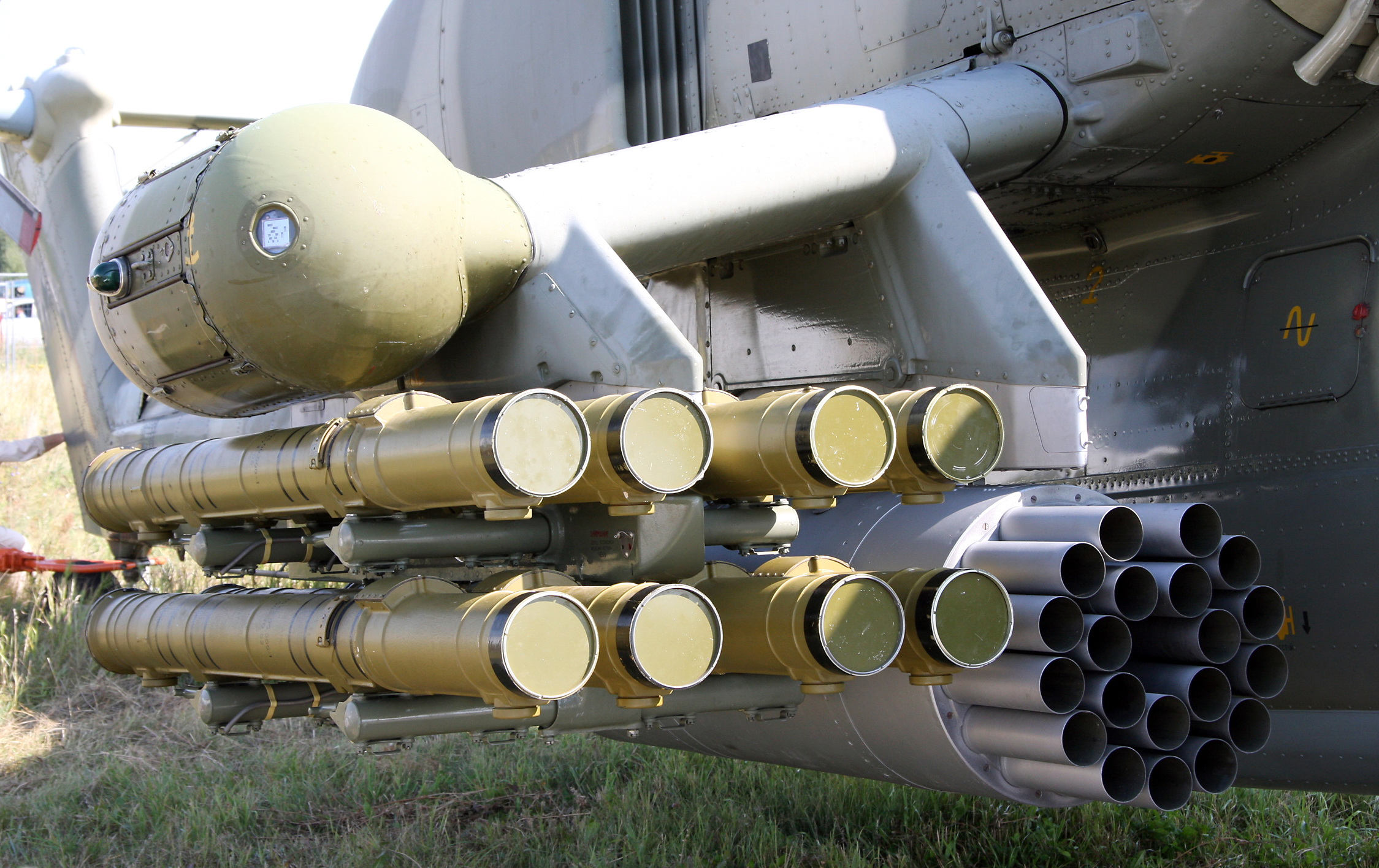 Ми-28Н c блоком Б-8В20А и ПТУР "Атака-В"